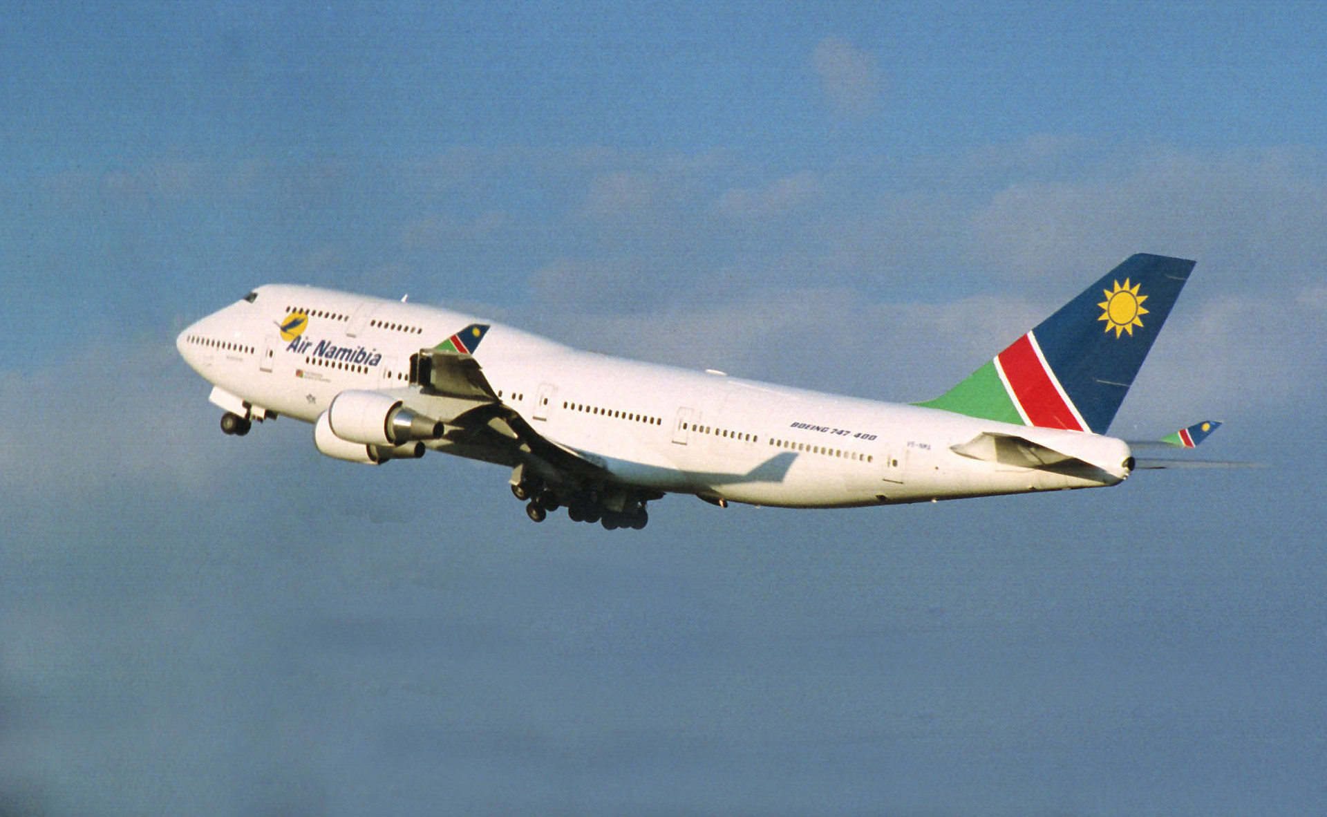 Air Namibia B747-48EM V5-NMA